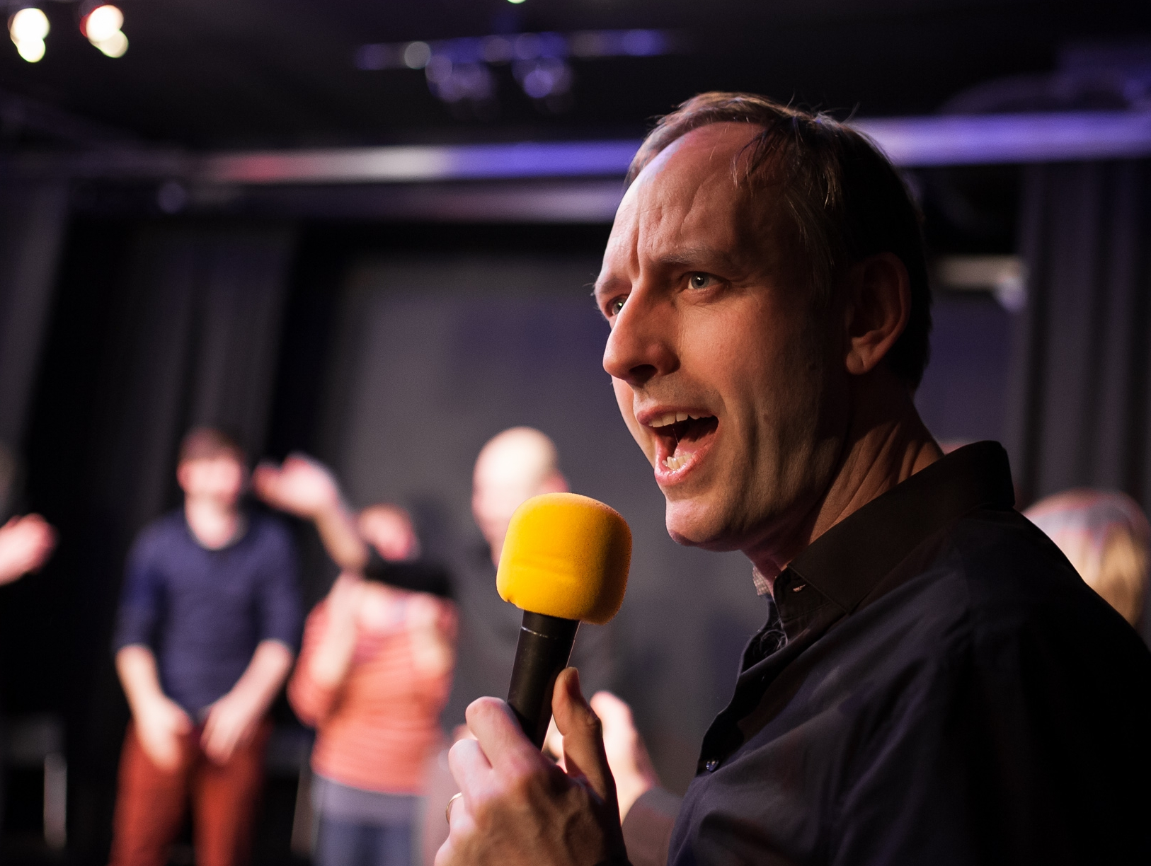 Leon Düvel vom Berliner Improvisationstheater Die Gorillas moderiert eine Improshow im Ratibor Theater.